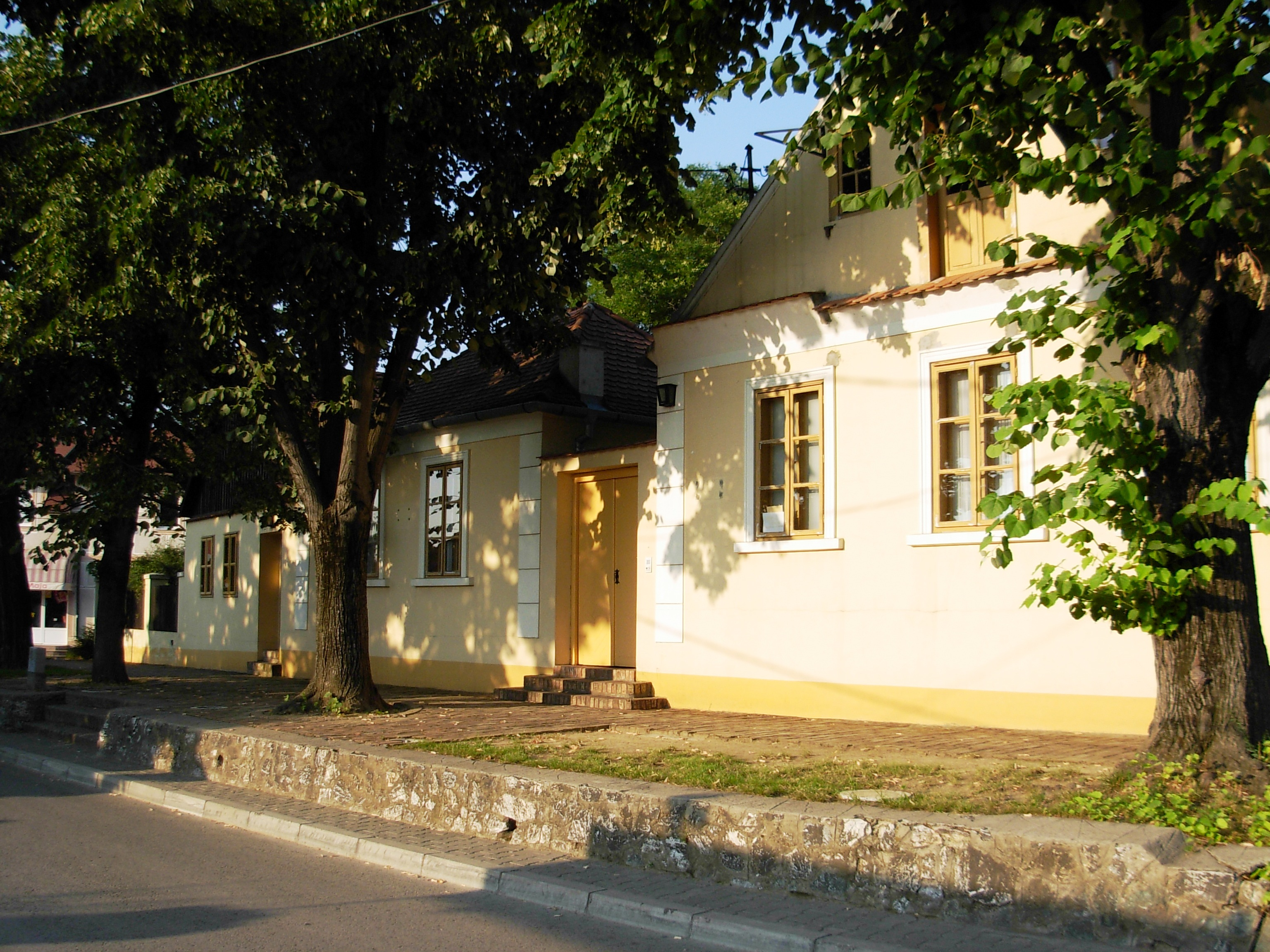 Zmajev muzej u Sremskoj Kamenici.